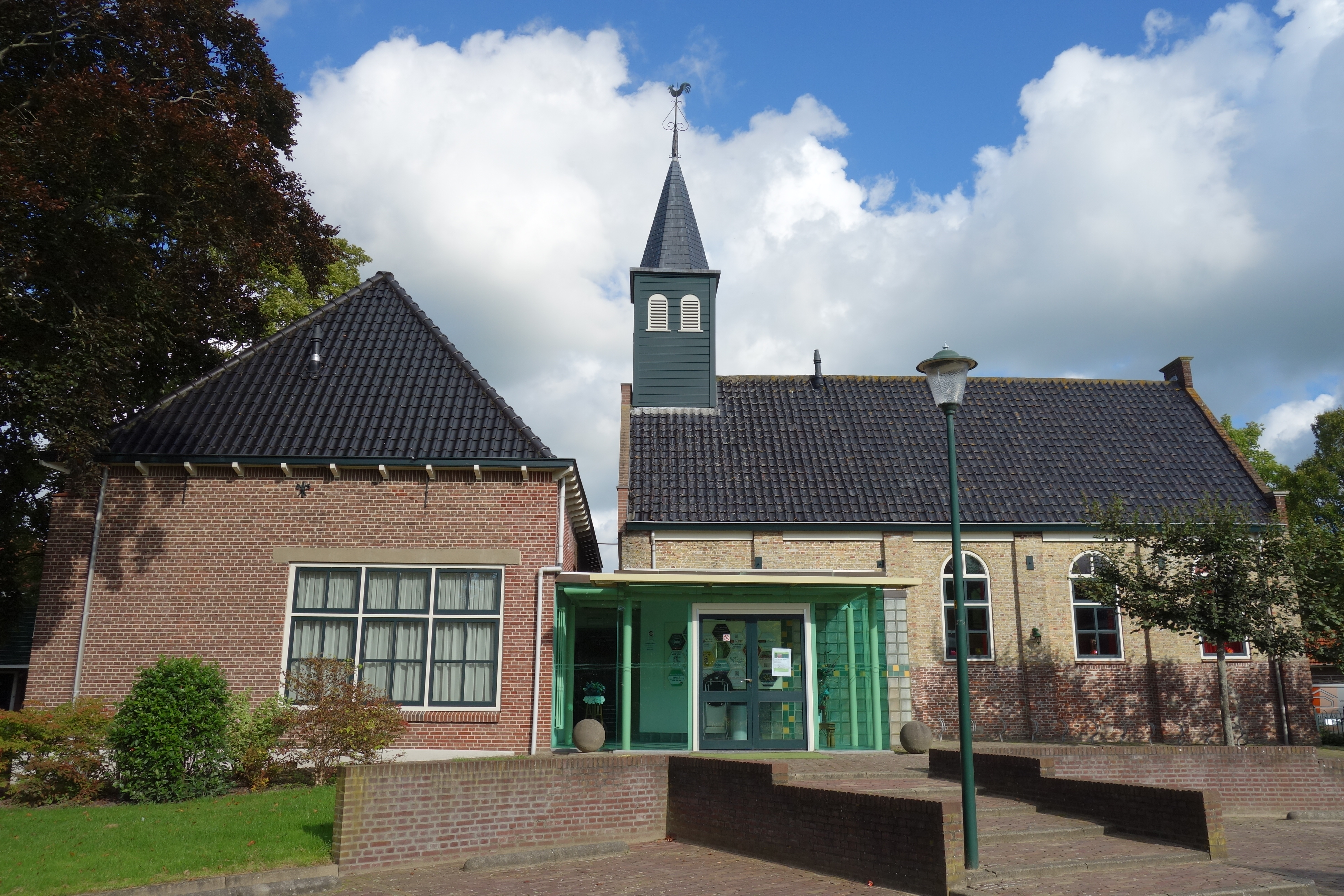 Overzicht van Cultureel Centrum Bessie in Nibbixwoud. De moderne ingang is geplaatst nadat de kerk buiten gebruik is genomen.